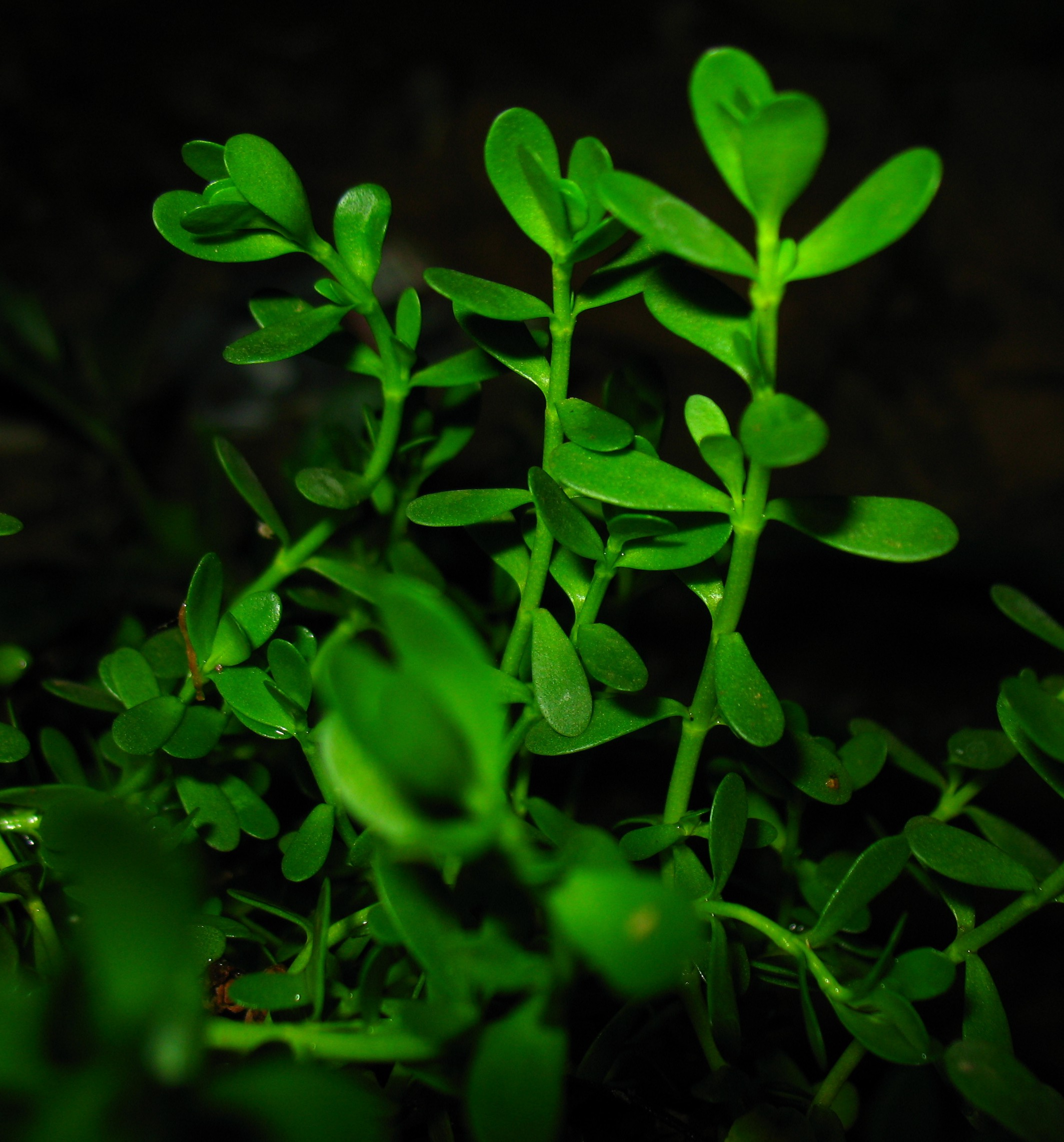 ബ്രഹ്മിയുടെ രാത്രി ദൃശ്യം